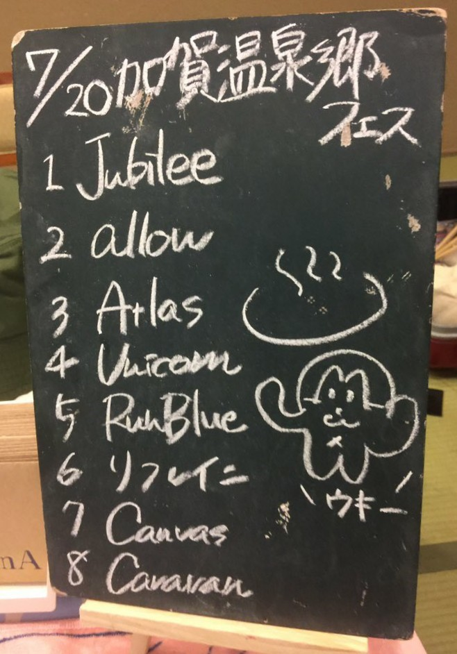 amiinAセトリボード